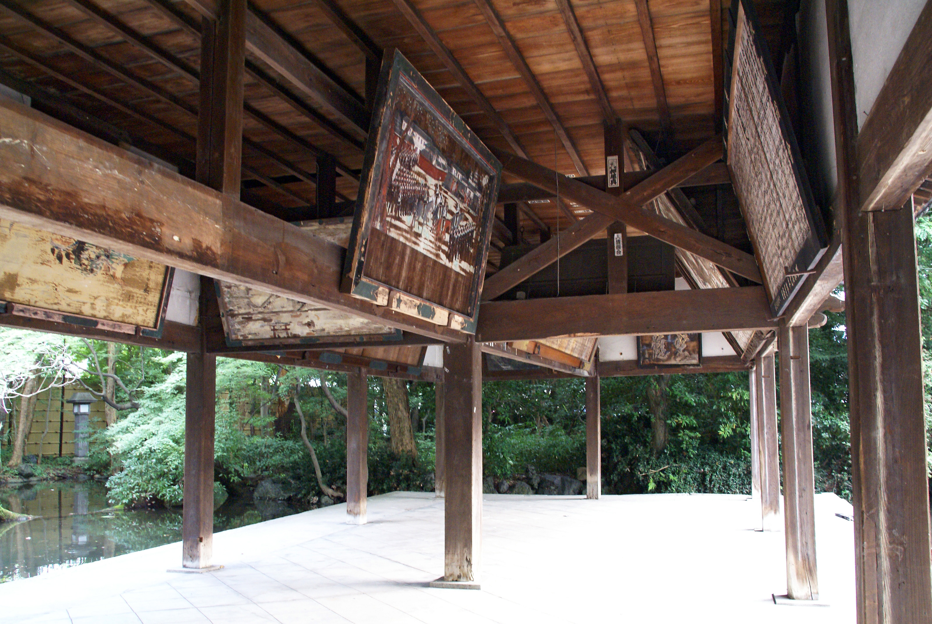 Kehi-jingu in Tsuruga, Fukui prefecture, Japan